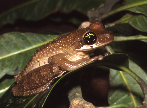 Osteocephalus elkejungingerae